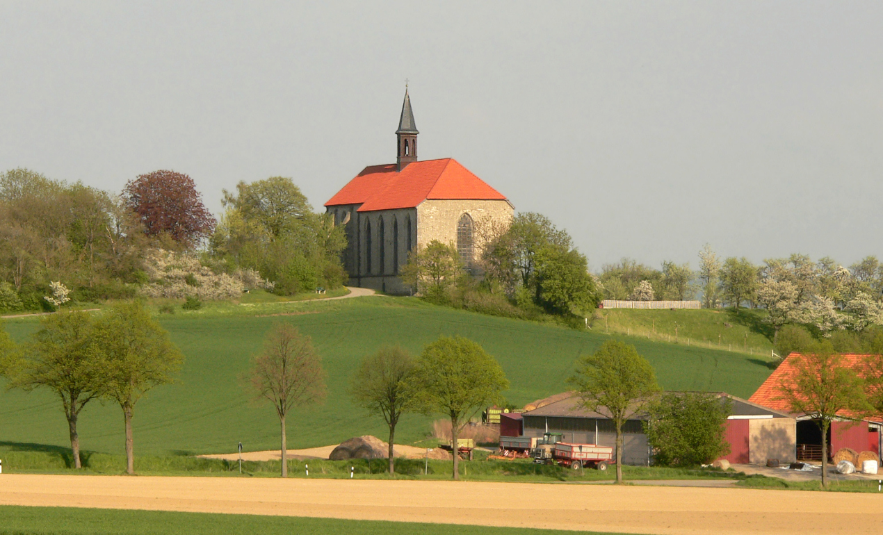 Kloster Wittenburg von Westen